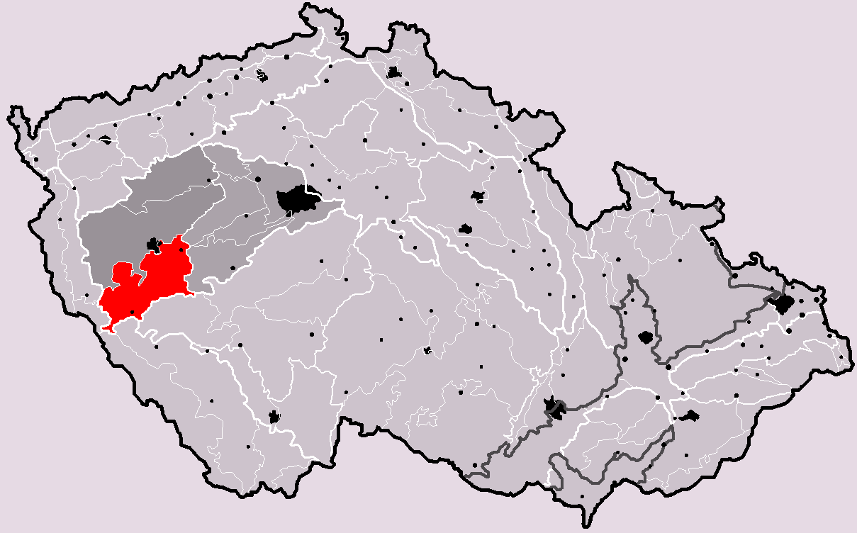 Poloha geomorfologického celku Švihovská vrchovina v rámci České republiky. Hercynský systém Hercynská pohoří I Česká vysočina I5 (V) Poberounská subprovincie I5B (VB) Plzeňská pahorkatina I5B-3 (VB-3) Švihovská vrchovina